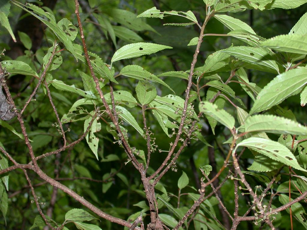 Oreocnide pedunculata：ハドノキ 2006/08/10 沖縄本島北部：Okinawa Island, Japan